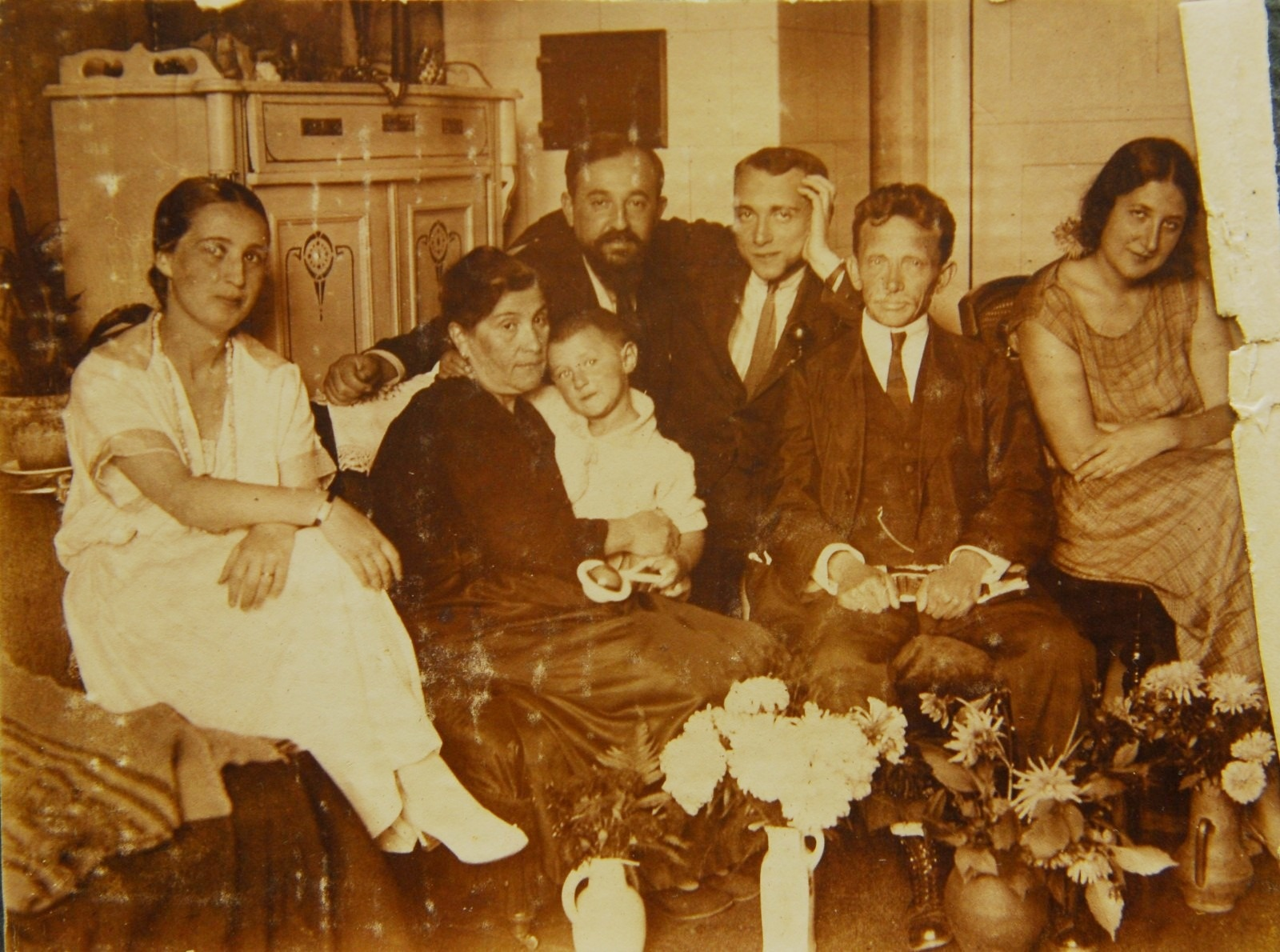 יוסף מישן היה רופא, קרדיולוג, ייסד את הקתדרה להיסטוריה ולפילוסופיה של הרפואה, בבית ספר לרפואה, אוניברסיטת תל אביב יוסף מישן (שלישי מימין) עם אביו רחמיאל (שני מימין), אשתו טסיה לבית סוקוליק (ראשונה משמאל), אמו (שניה משמאל), גיסתו (אשתו של אחיו לזר, ראשונה מימין) ובעלה השני של גיסתו.